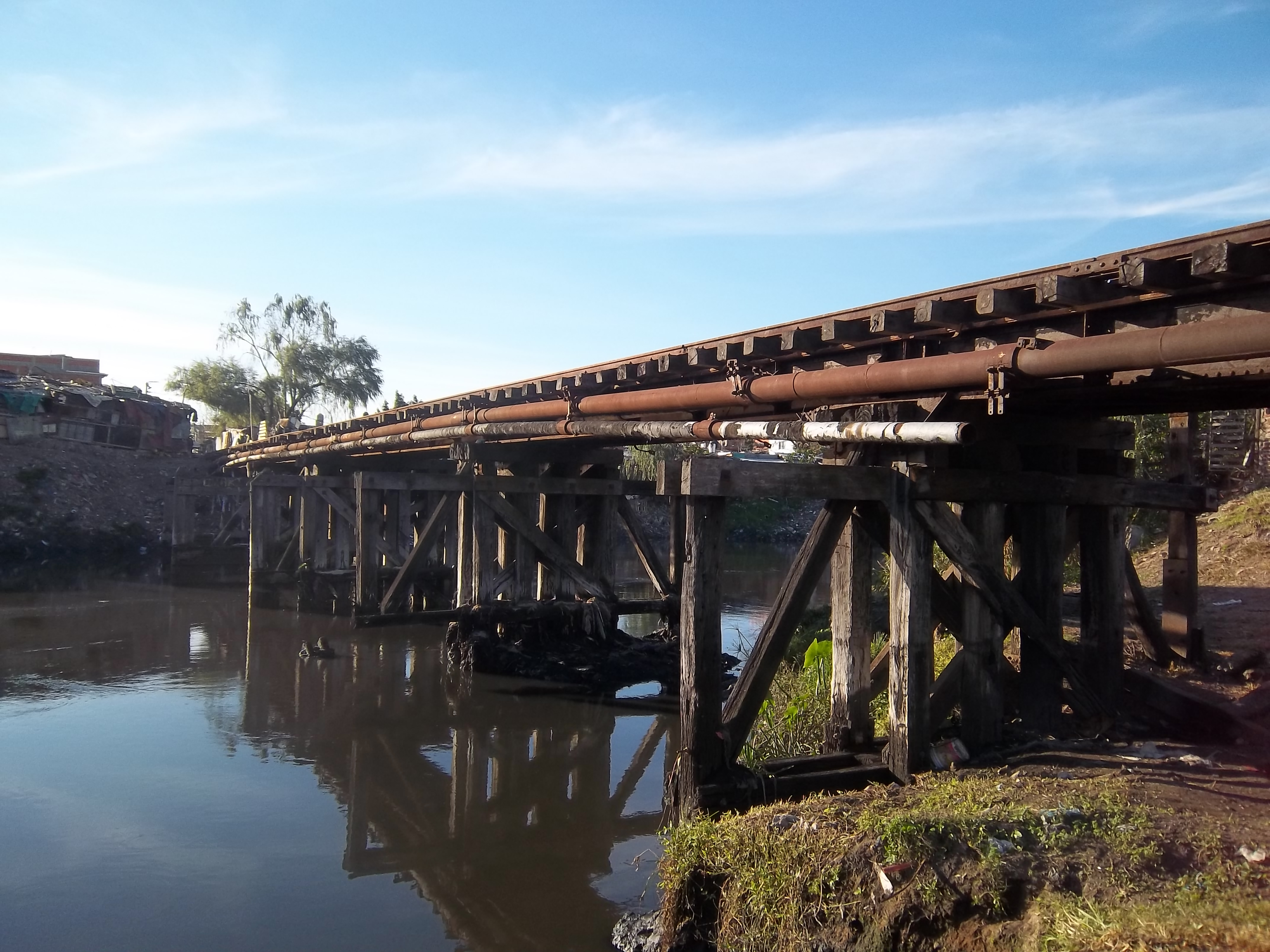 Puente sobre el Riachuelo Ingeniero Brian del ferrocarril Roca para cargas exclusivamente contruido en 1902. Visto desde Piñeyro, partido de Avellaneda, Buenos Aires. Al fondo, villa 21-24 en la ciudad de Buenos Aires, Argentina.